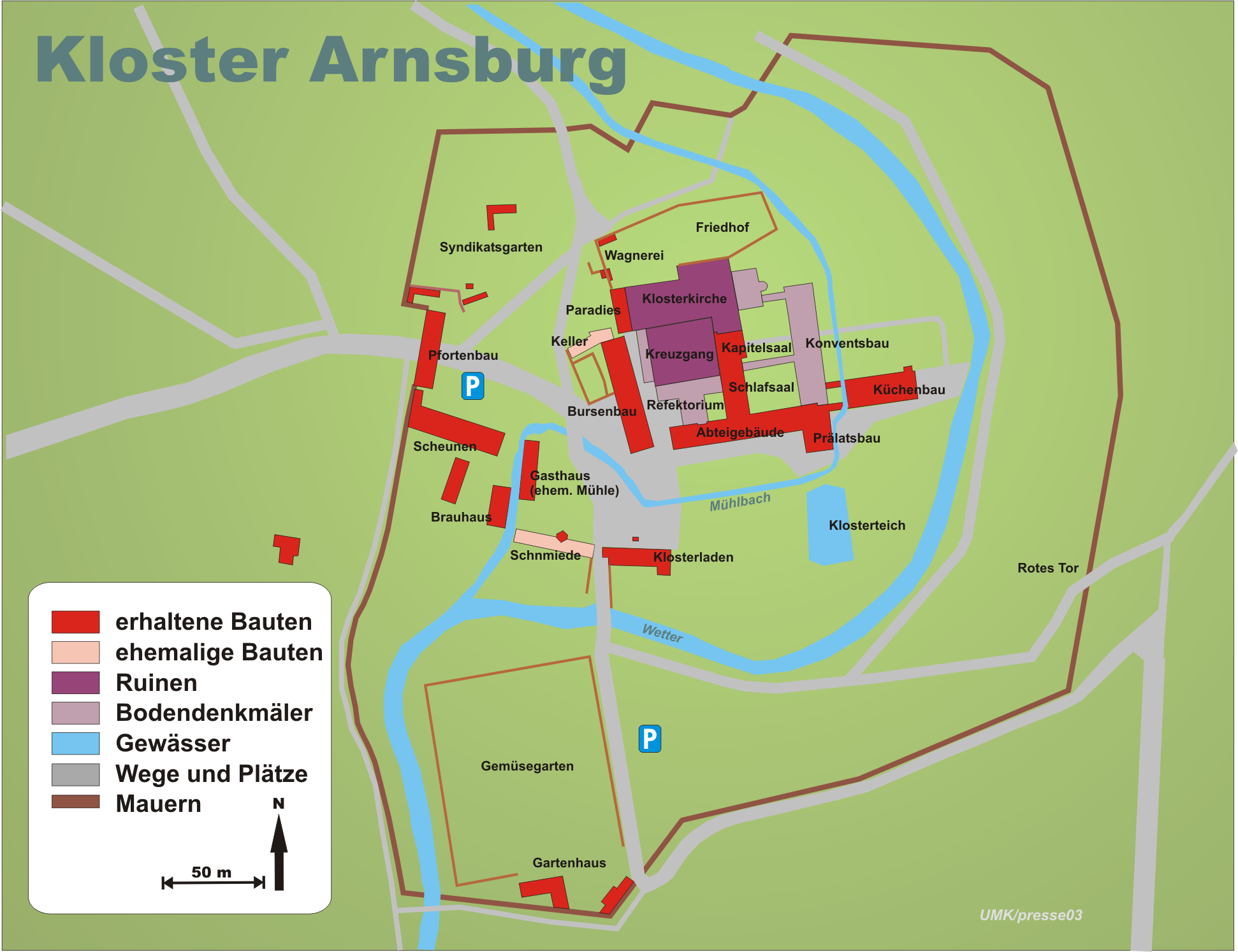 Karte Kloster Arnsburg in der Wetterau, Hessen, Germany